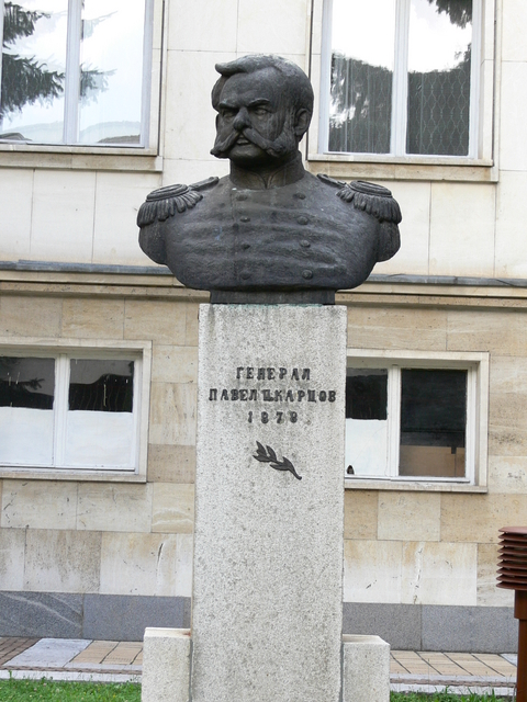 Бюст генерал-лейтенанта Павла Карцова, участника русско-турецкой войны 1877-1878 годов, в Трояне, Болгария